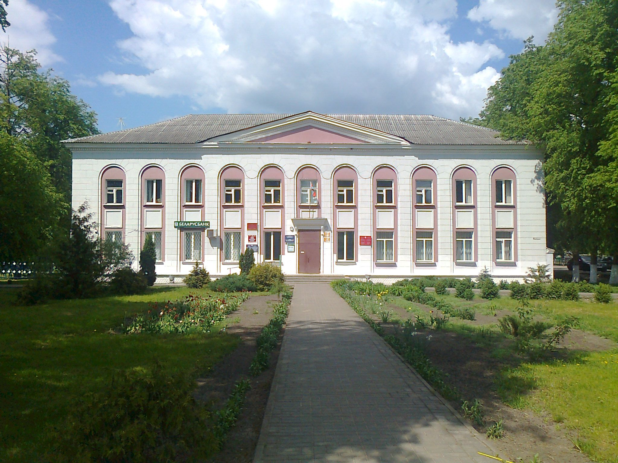 Будынак горсавета ў Васілевічах, Рэчыцкі раён, Гомельская вобласць